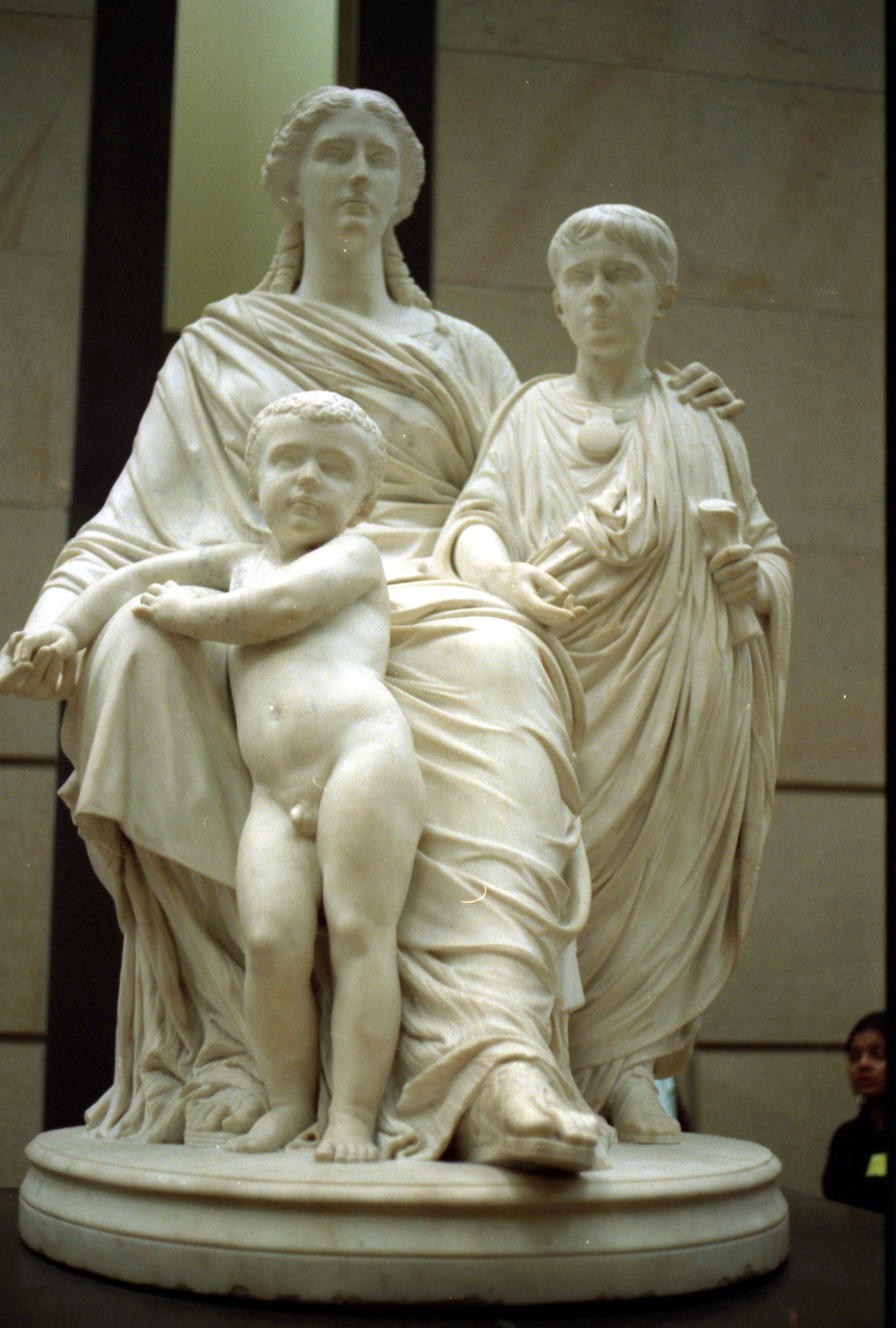 Jules Cavelier (Français, 1814-1894): Cornélie, mère des Gracques (Cornelia Africana), groupe en marbre, hauteur : environ 1,60 m - d'après le plâtre exposé à l'exposition universelle de 1855, salon de 1861, acquis en 1861, dépôt du Musée du Louvre - n° Inv RF 164